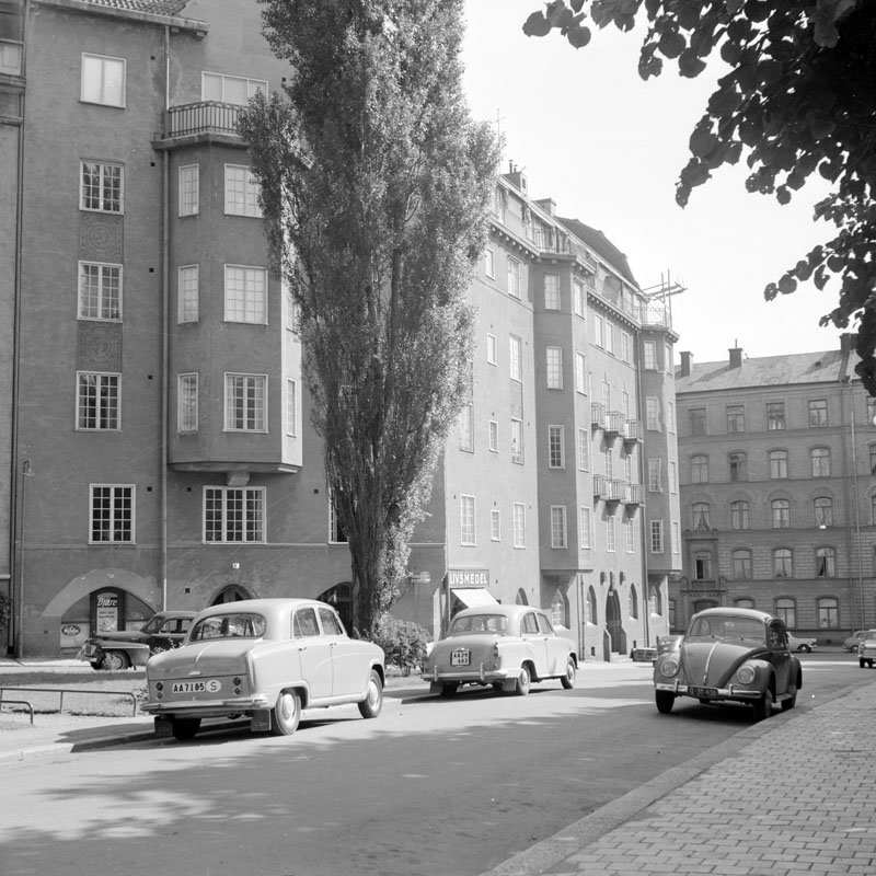 Lovisagatan 2-4, gatubild. I fonden kvarteret Bajonetten.